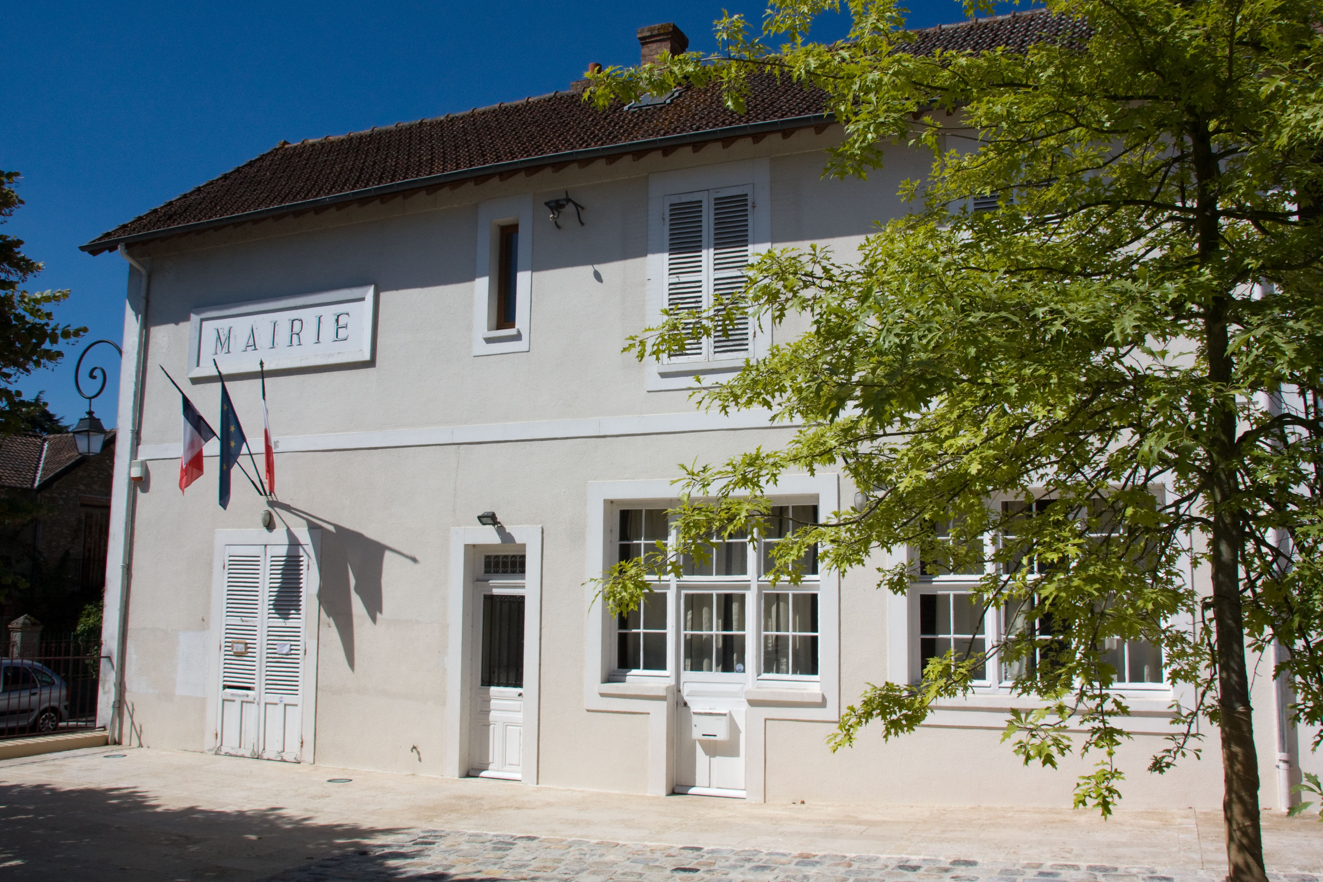 Mairie de Morsang-sur-Seine, Morsang-sur-Seine, Essonne, France